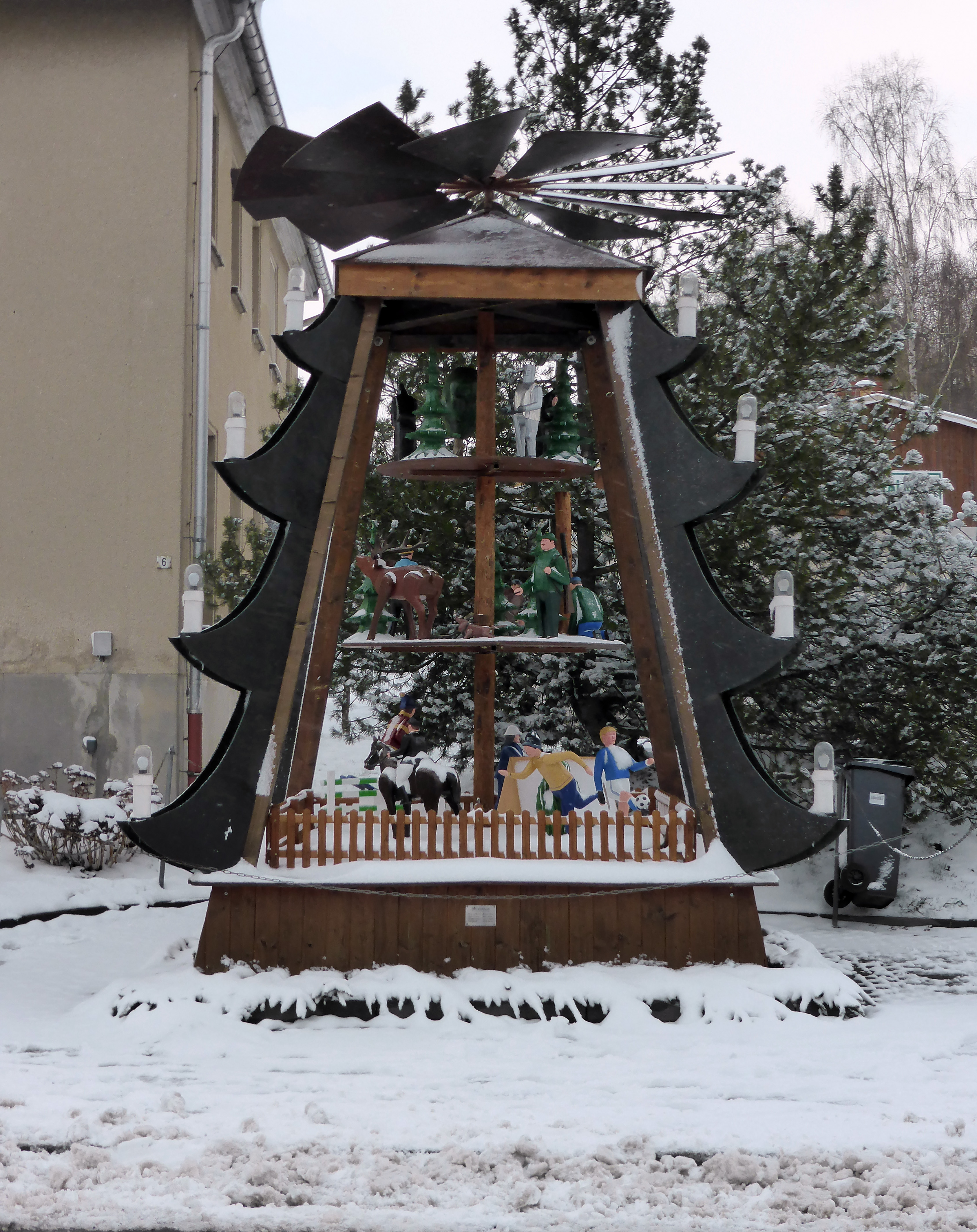 Ortspyramide in Pfaffroda, Erzgebirgskreis - Sachsen.